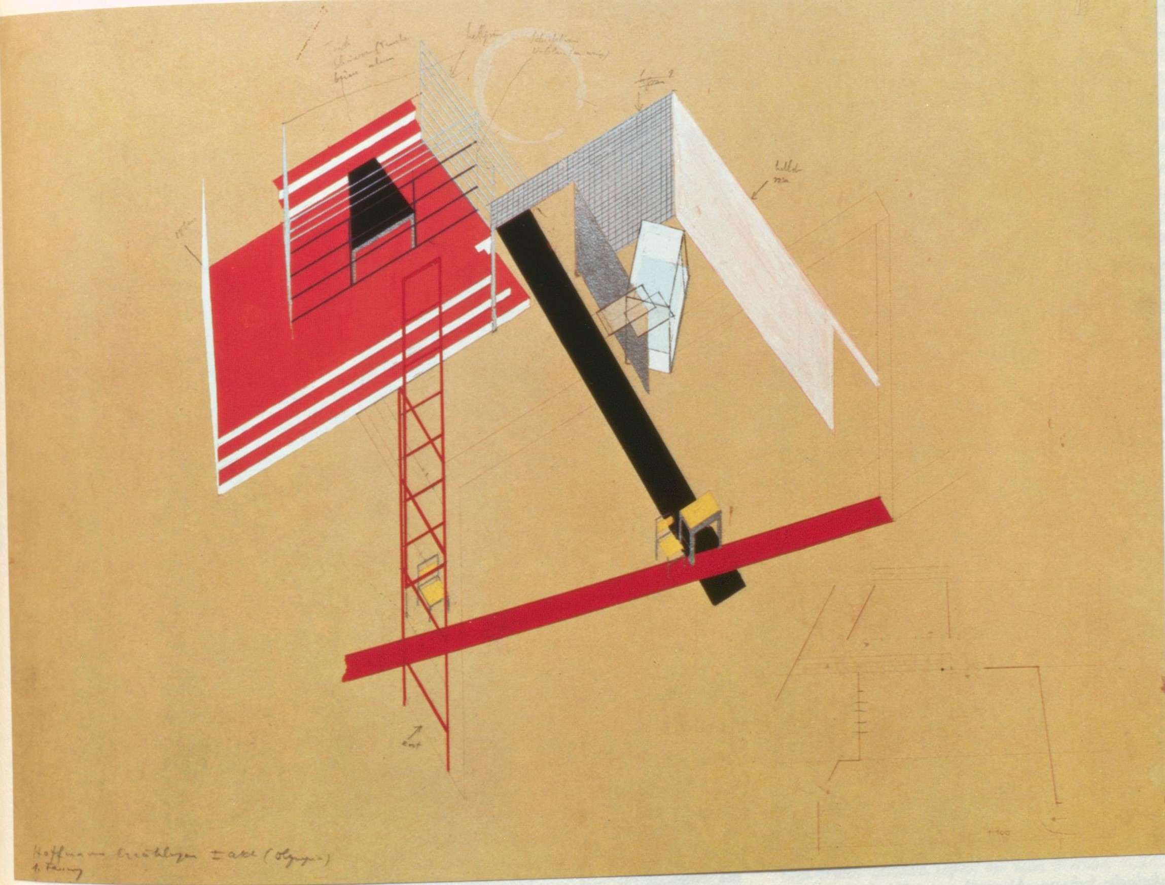 László Moholy-Nagy Bühnenbildentwurf zu Jacques Offenbach Hoffmanns Erzählungen 1. Bild Krolloper 1929